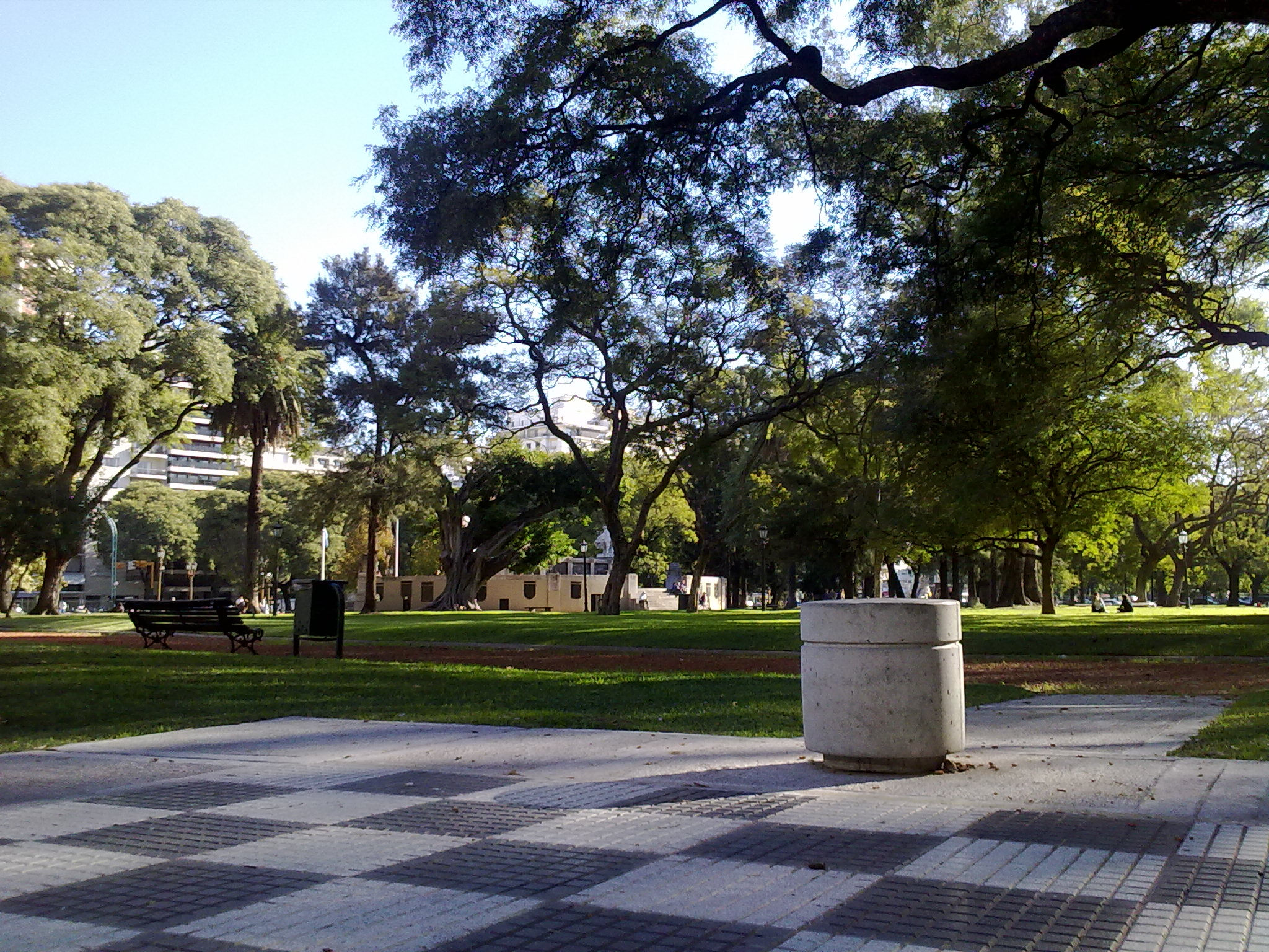 Plaza Alemania, Palermo, Buenos Aires, visto desde su tablero de ajedrez.